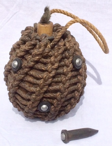 Brandballen (Rekonstruktion) mit eingesetzter Brandröhre und Mordschlägen